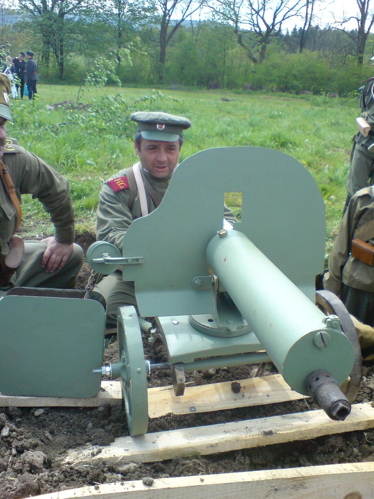 Maxim M1910 (replika) w Sękowej powiat Gorlicki podczas rekonstrukcji bitwy pod Gorlicami 08-V-2011. Okopy Rosjan.